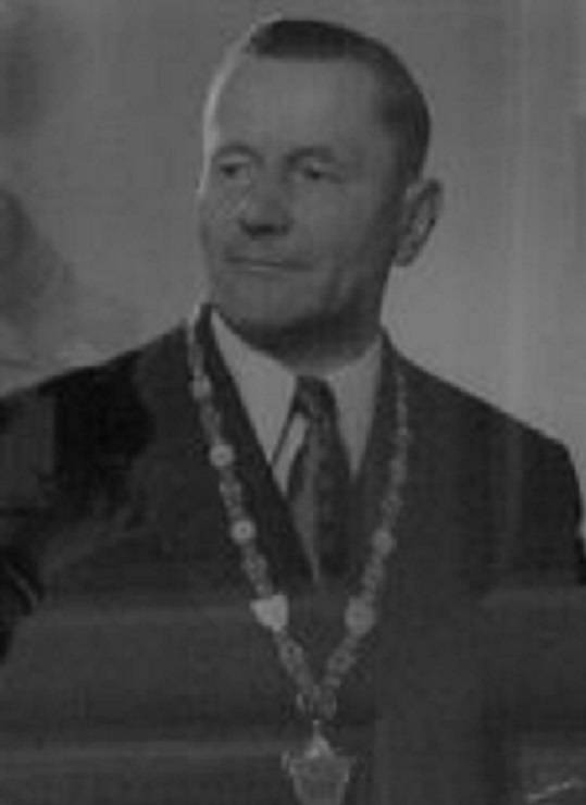 Johann Baumann, Bürgermeister von Wörth Donau 1946 bis 1965